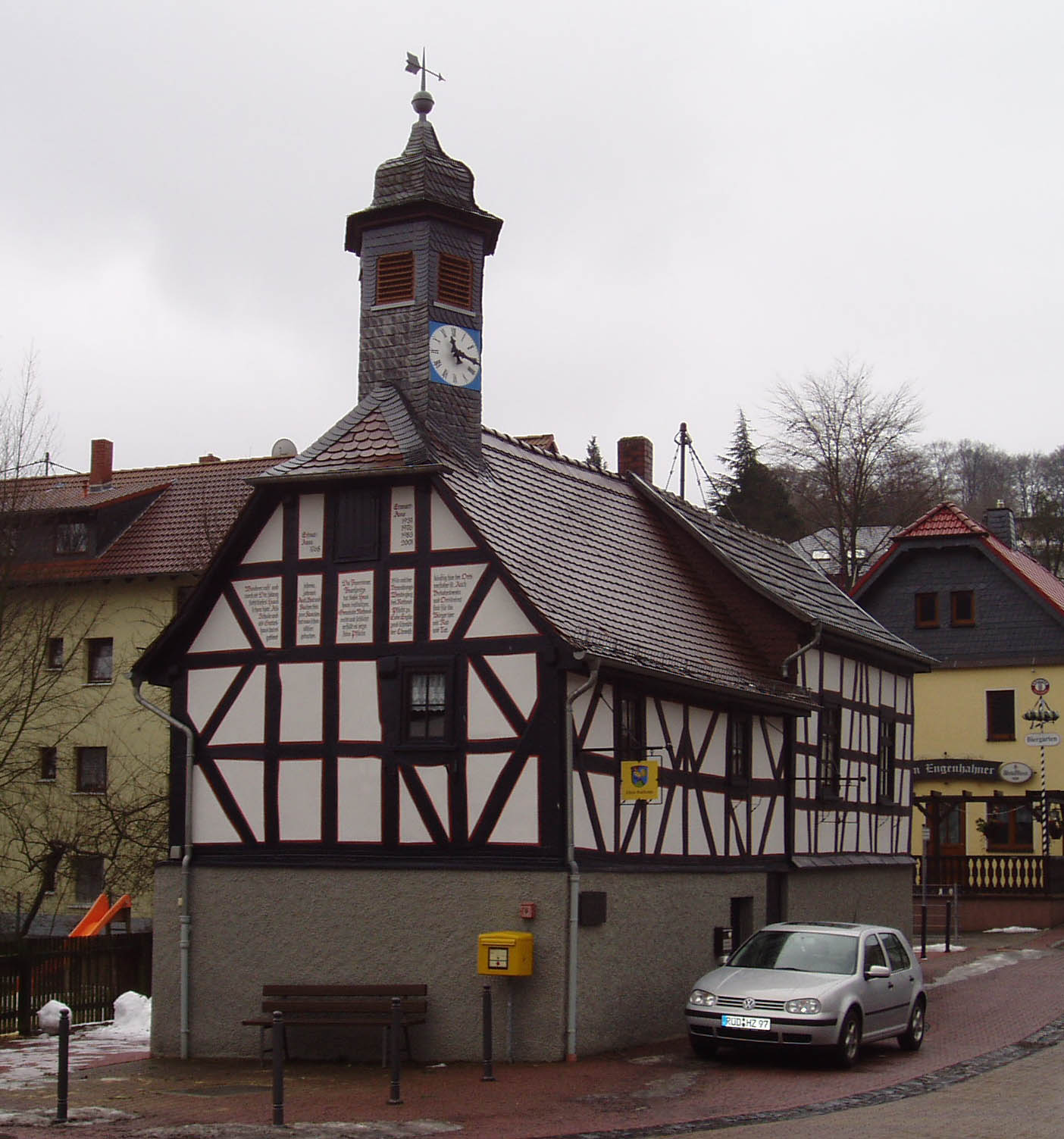 Altes Rathaus in Niedernhausen-Engenhahn im Taunus